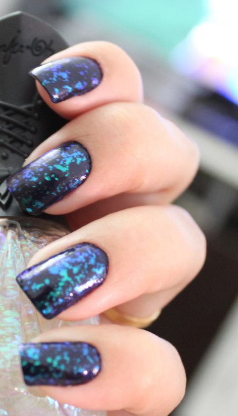 Enfim, eu usei o meu esmalte flocado! Não preciso dizer como esse esmalte é fantástico, certo?! Fiquei maravilhada com esse efeito, muito mais bonito do que eu achava! Esse é o NFU-OH 40, que reflete verde e azul, um arraso! Acho que nunca um esmalte meu fez tanto sucesso como esse! Todo mundo perguntando sobre ele... Usei uma camada do Marina da Sancion Angel mais uma de Nfu-oh 40. Gostei tanto que até estou com dó de ter que tirar! Quem gosta de flocado levanta a mão!